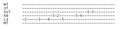 tablature Exemple de tablature (ceci n'est pas un morceau ni même une compostition, les notes ayant été choisies au hasard)